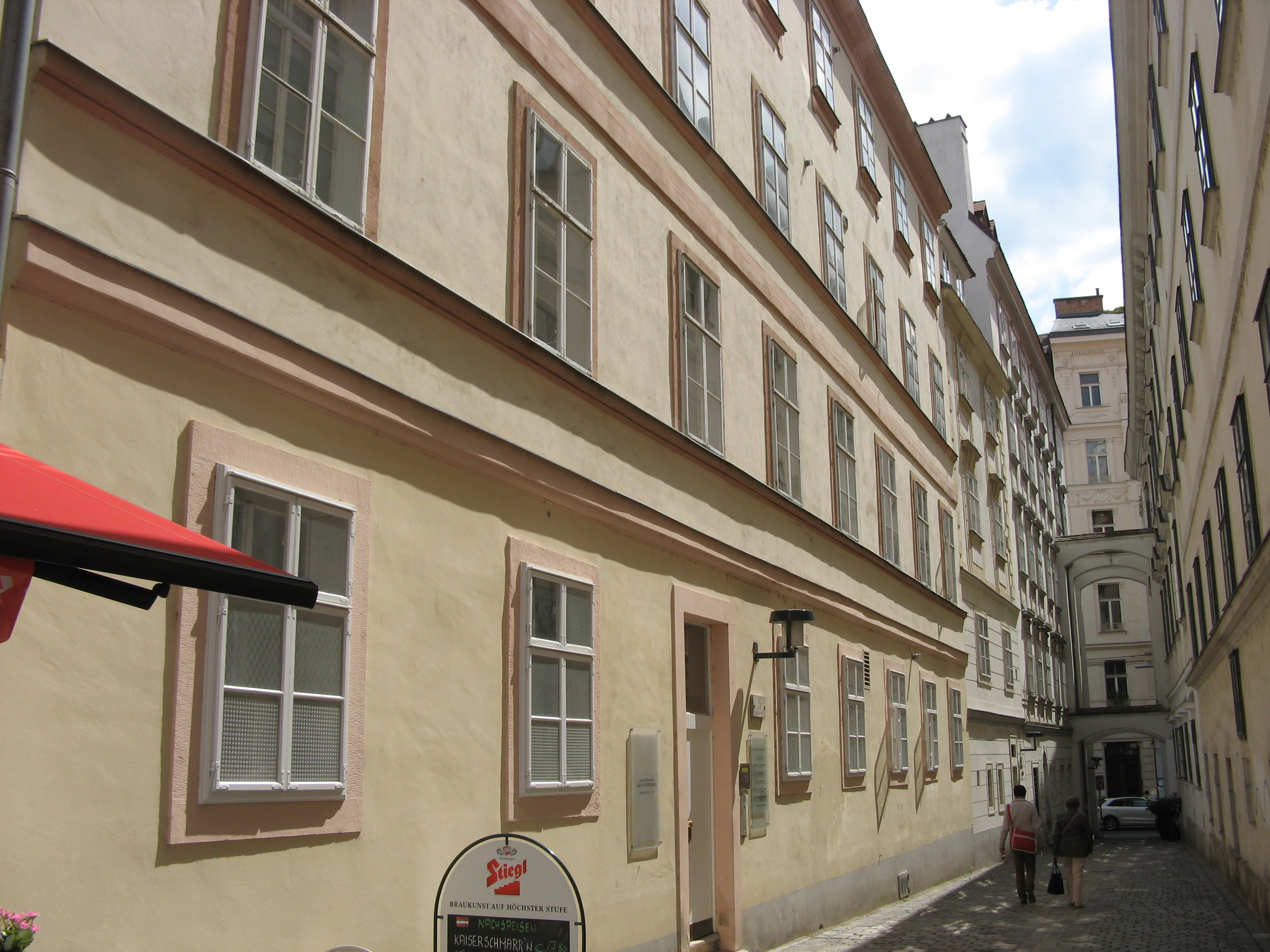 Blutgasse 5 (1819), Wien-Innere Stadt